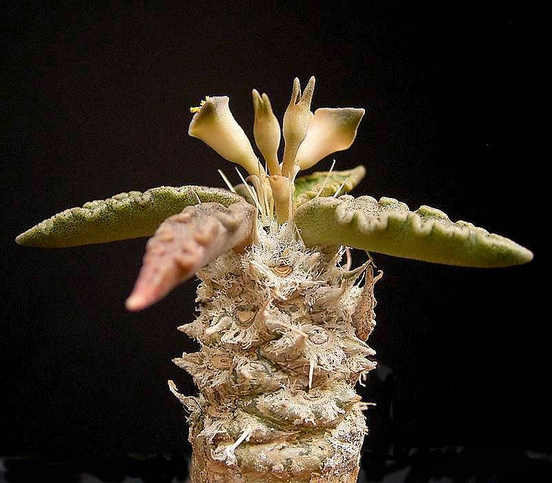 Euphorbia tulearensis